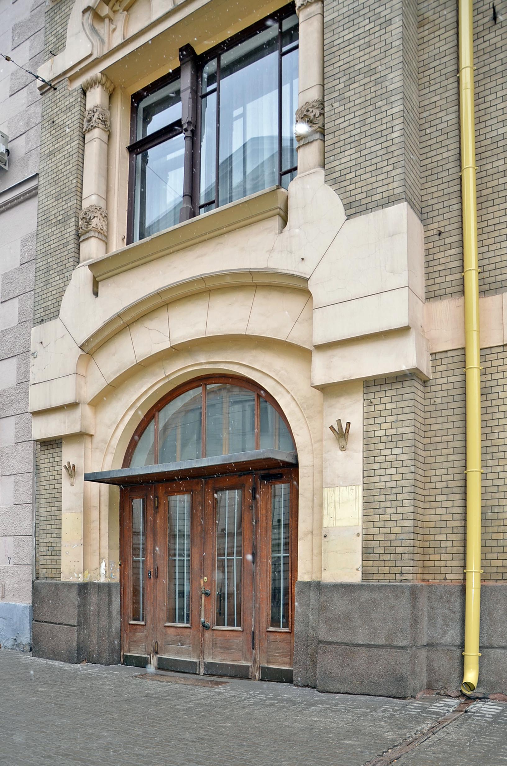 Парадный вход в особняк Саарбекова на Поварской улице в Москве